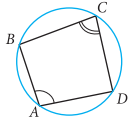 նկար 3